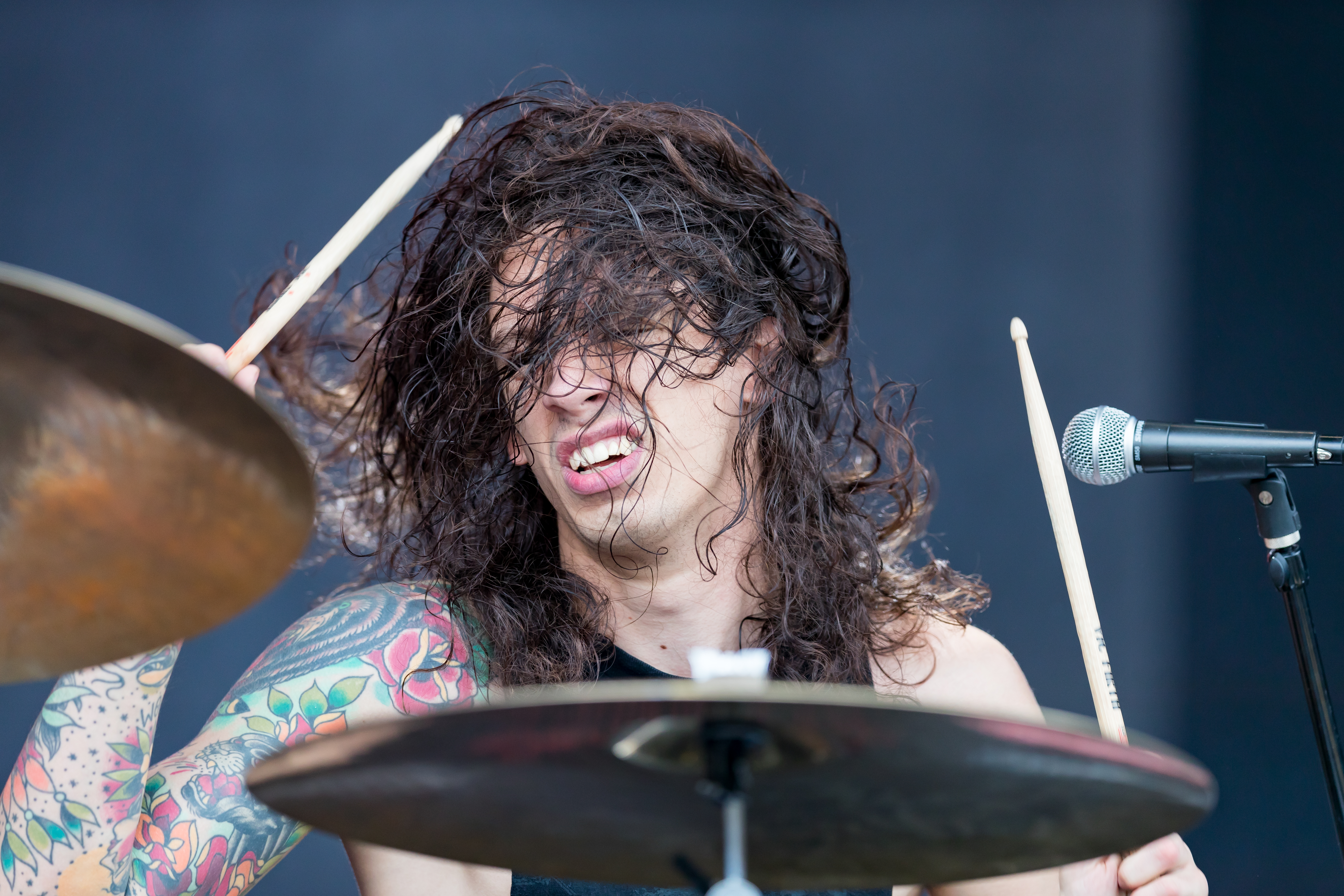 Code Orange during Rock am Ring at Nürburgring, Nürburg, Rheinland Pfalz, Germany on 2017-06-04, Photo: Sven Mandel